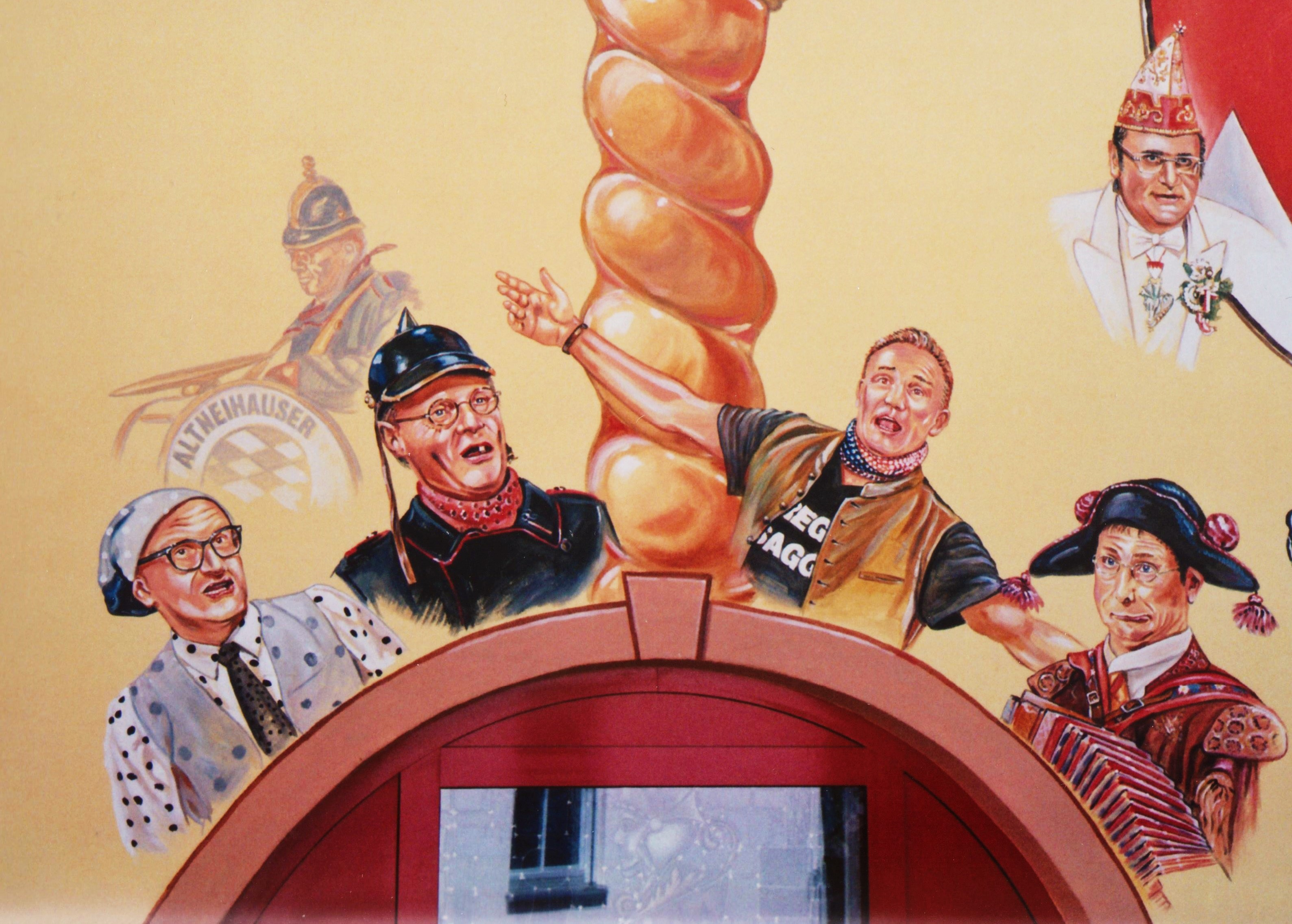 Veitshöchheim, Haus der Fränkischen Fastnacht, Fassadenmalerei (2015) mit Motiven aus der Fernsehsendung „Fastnacht in Franken“: Links von der Säule die "Altneihauser Feierwehrkapell'n" mit Norbert Neugirg (rechts), dem selbsternannten "Kommandant" der Altneihauser; links von ihm der Nürnberger Kabarettist Oliver Tissot; rechts von der Säule zunächst Michl Müller, der "Michl" aus Garitz - einem Ortsteil von Bad Kissingen, und rechts daneben der "Multifunktionsfranke", Kabarettist und Humorist Oti Schmelzer aus Oberschwappach im Steigerwald.